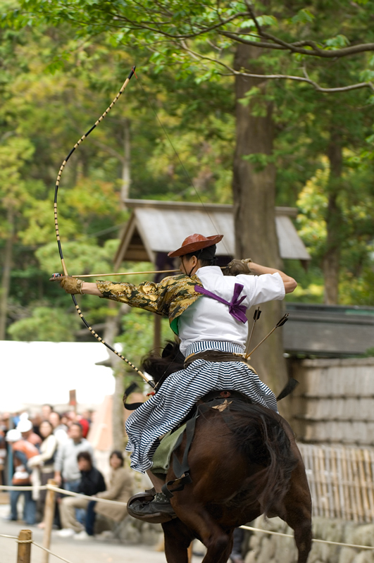 Kyudo Yabusame in Kamakura.